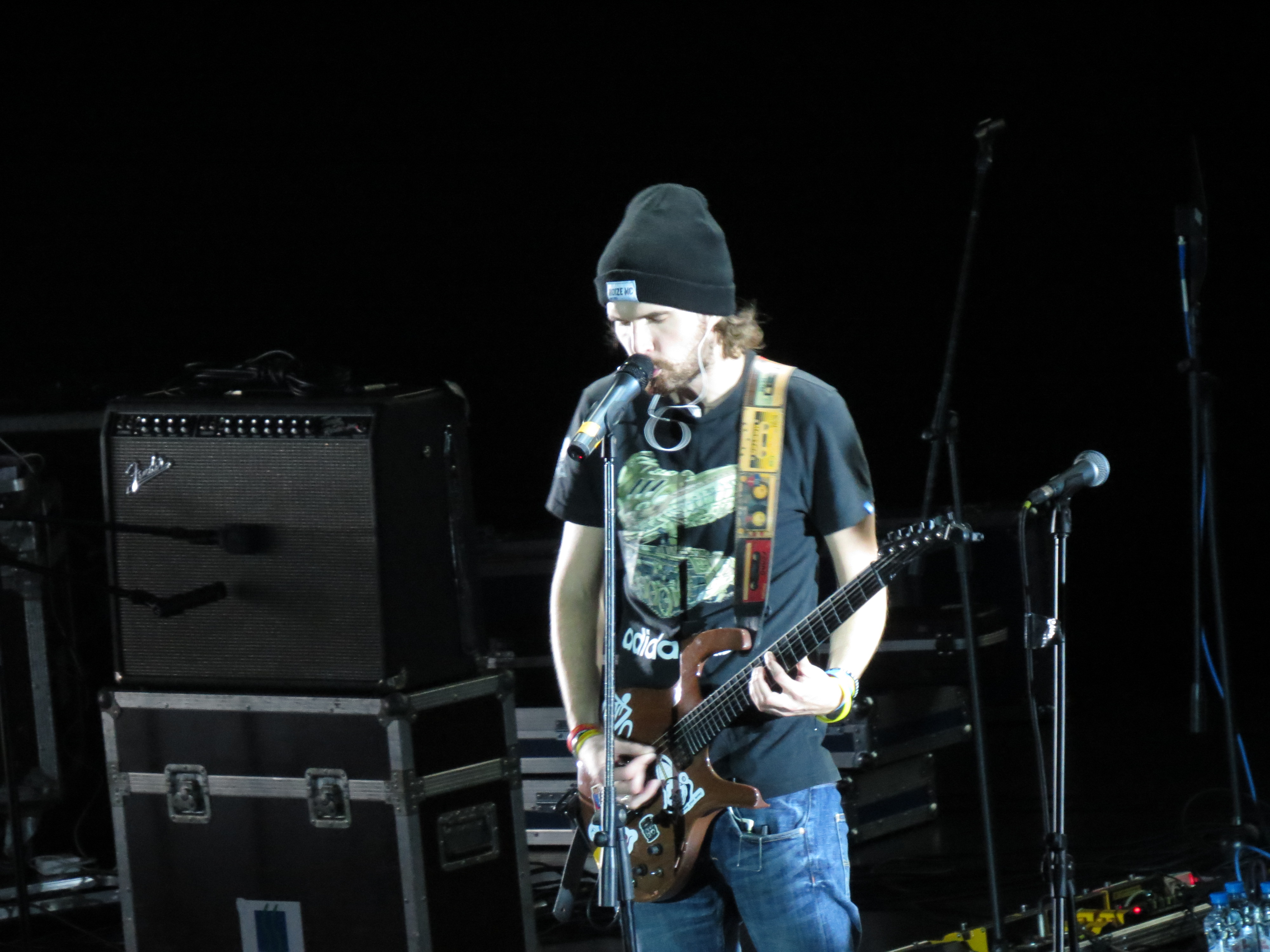 Благотворительный концерт «#РокУзник» в поддержку «узников 6 мая» в ТКЗ «Мир» 22 сентября 2013 года.